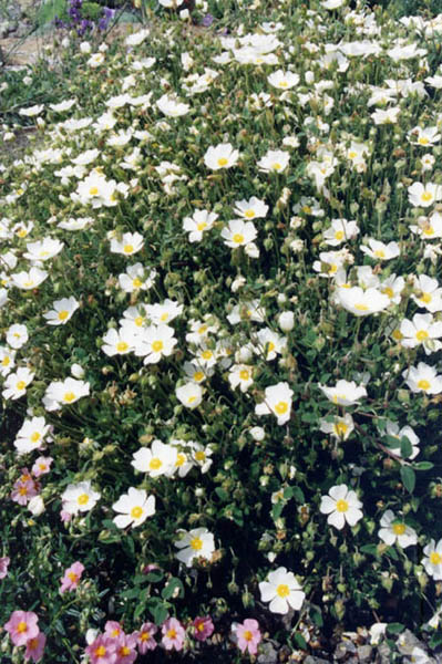 Cistus salviifolius